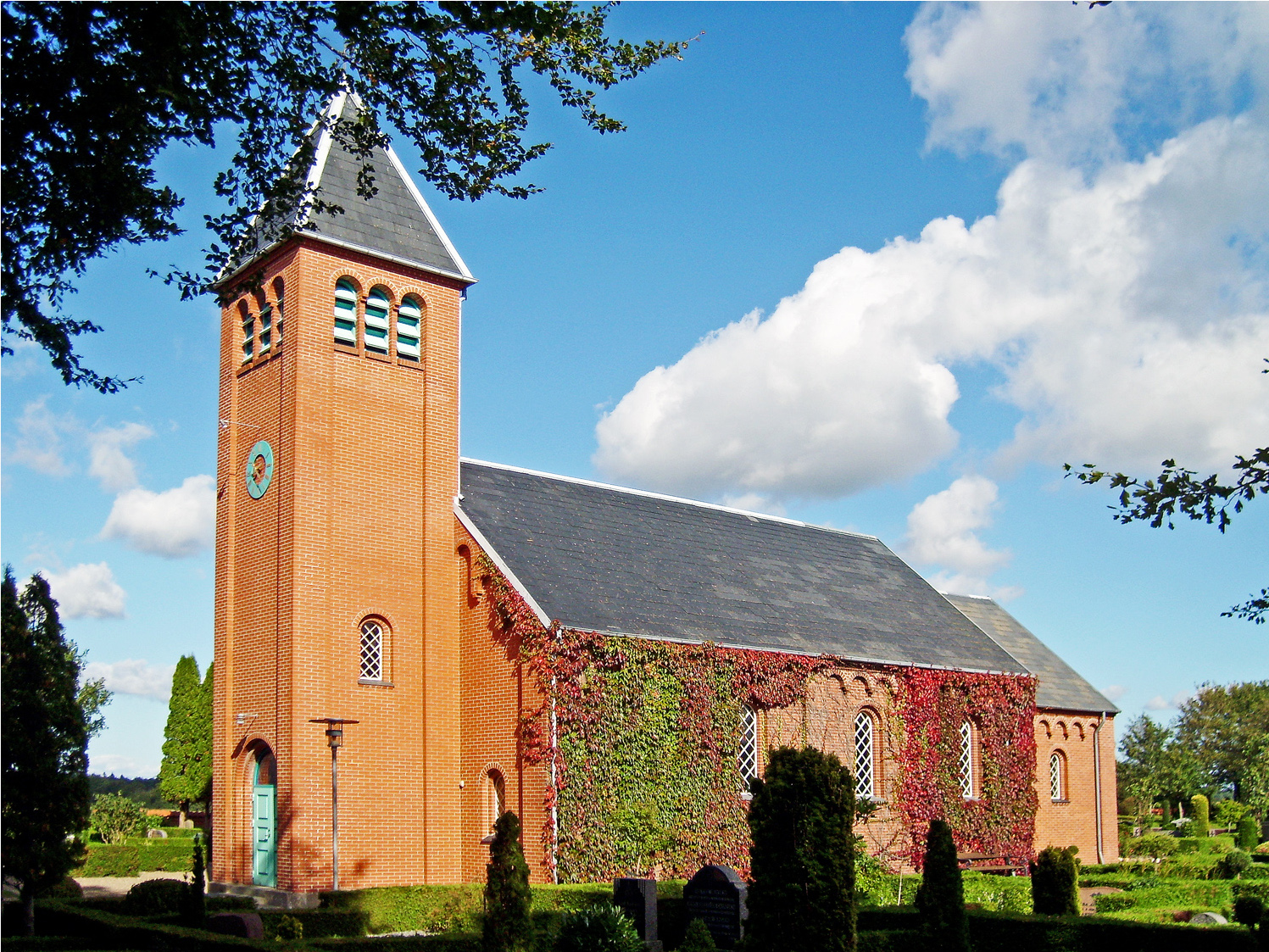 fra sydvest